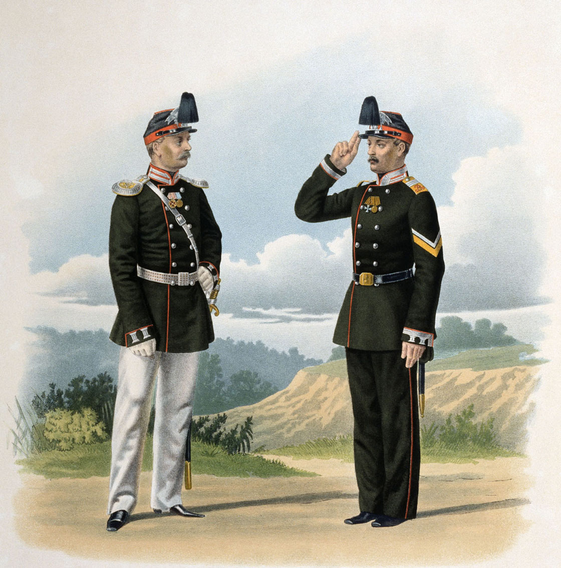 Oberoffizier und Unteroffizier vom Erewaner Leib-Grenadierregiment seiner Hoheit, 7. Juli 1863. (In Ausgangsuniform / Paradeuniform).